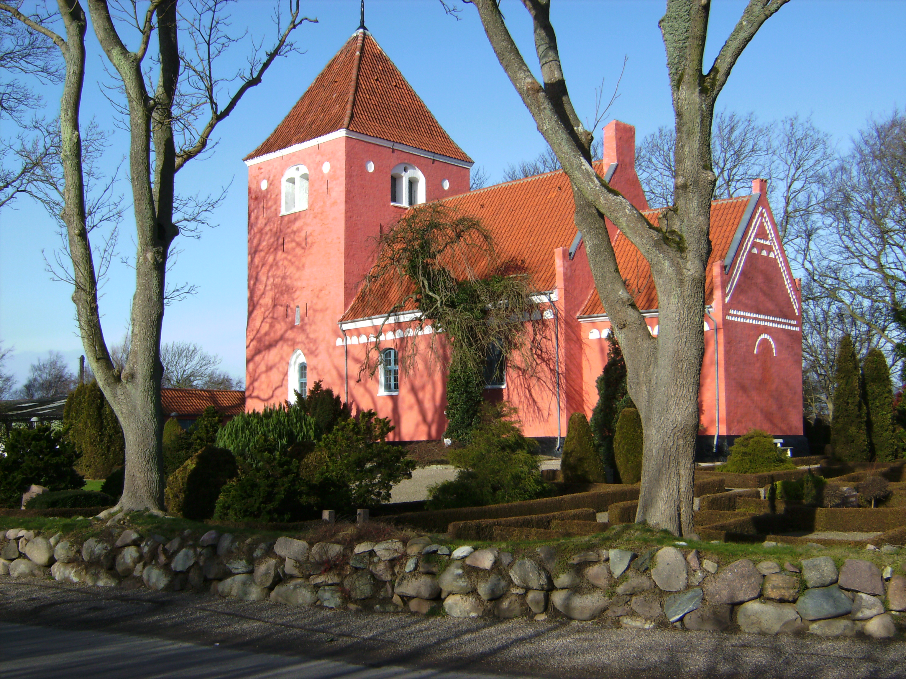 Herritslev Kirke